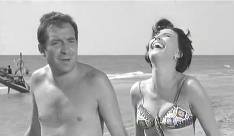 Ugo Tognazzi e Ilaria Occhini in una scena del film del 1961 Il mantenuto.